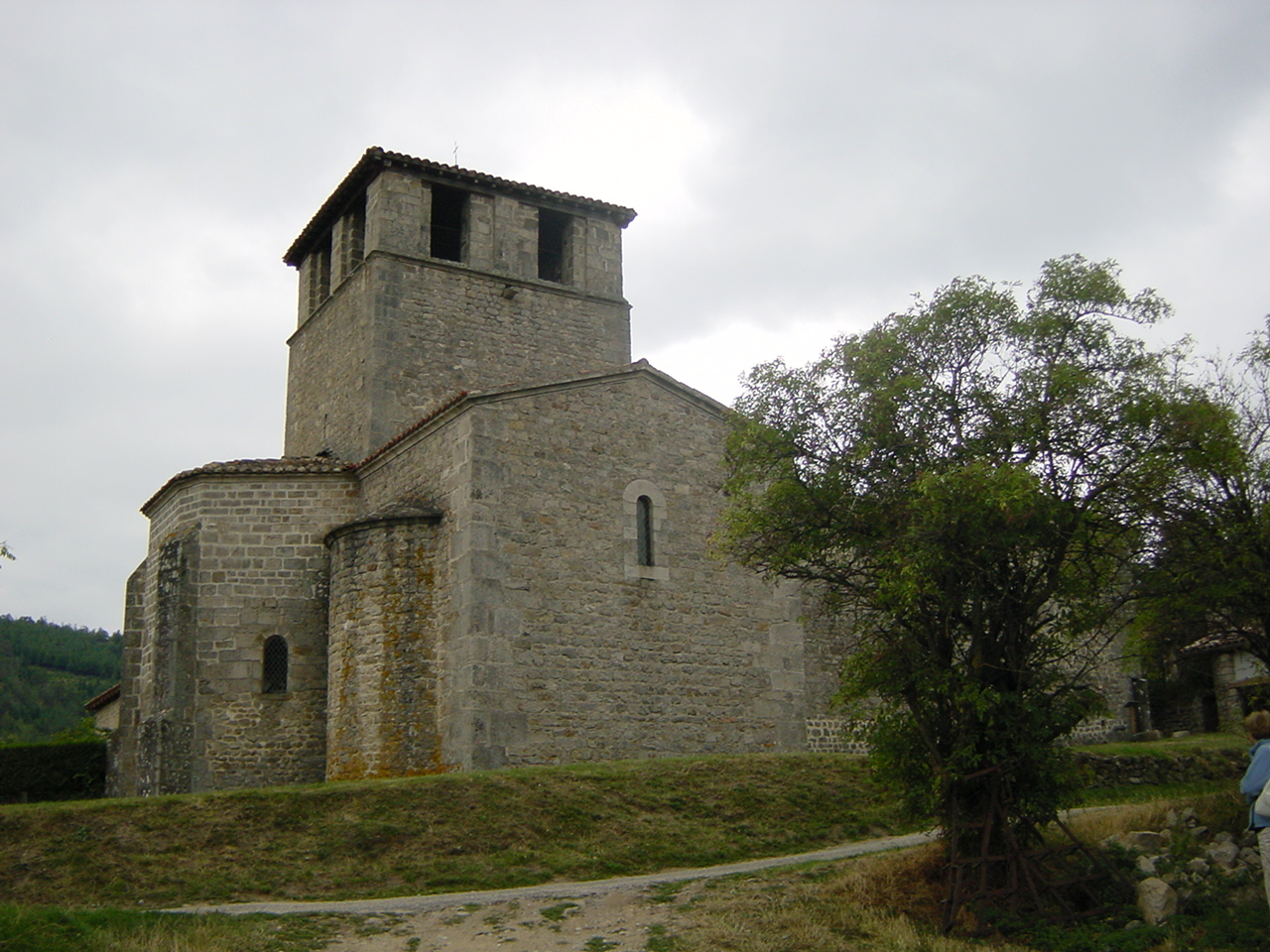 Veyrines est un hameau de la commune de Saint-Symphorien de Mahun en Ardèche. L'église est de style roman très pur. .